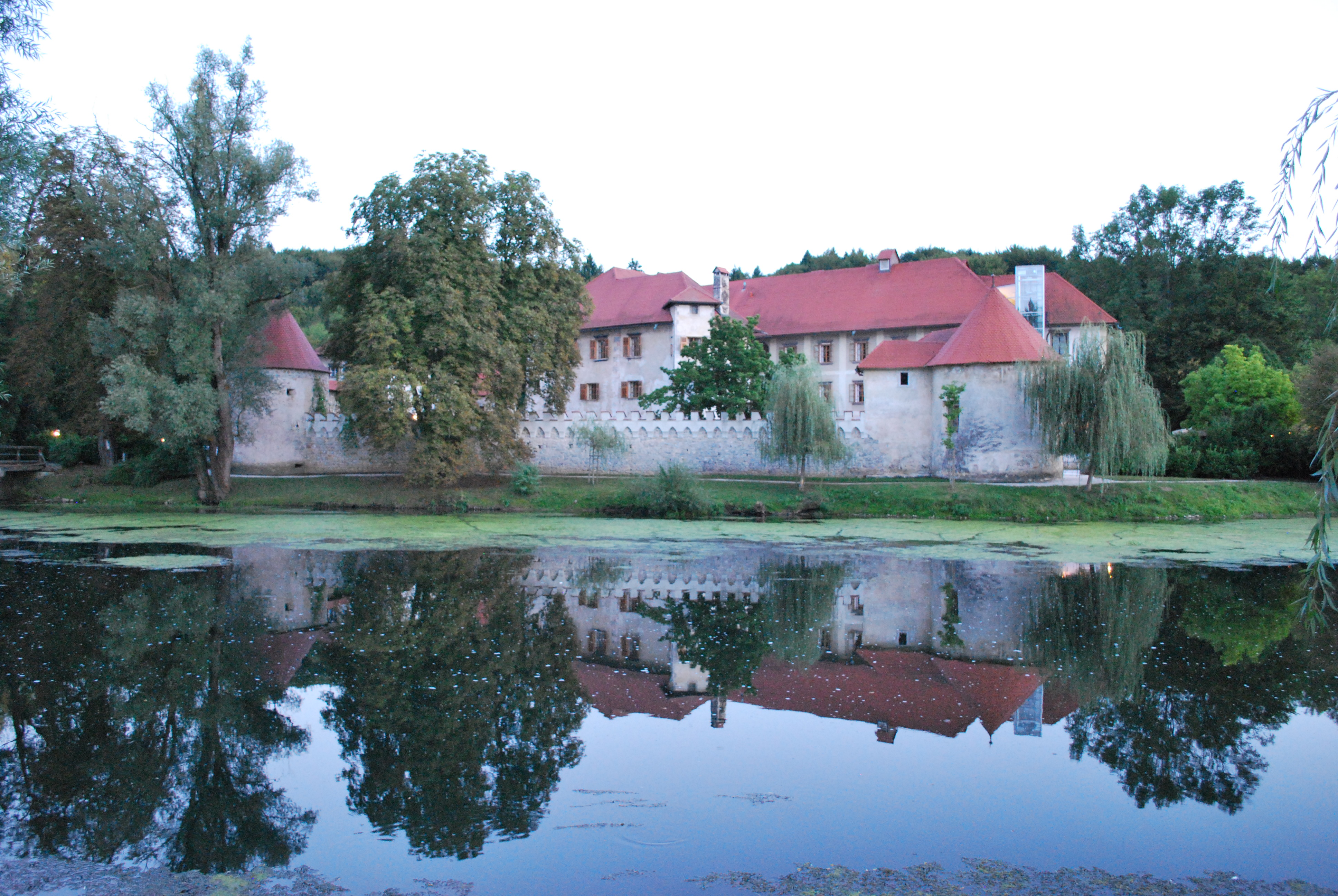 Ansicht des Schlosses Otocec, Gemeinde Novo Mesto, Landkreis Novo Mesto, Slowenien.